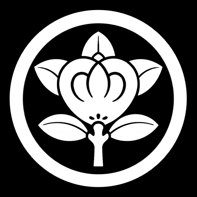 「丸に橘」紋（染抜）